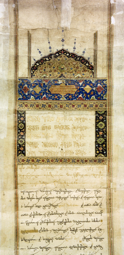 1597. კახეთის მეფე ალექსანდრე II-ის გუჯარი გარეჯის მეტოქი აკურის მონასტრისადმი